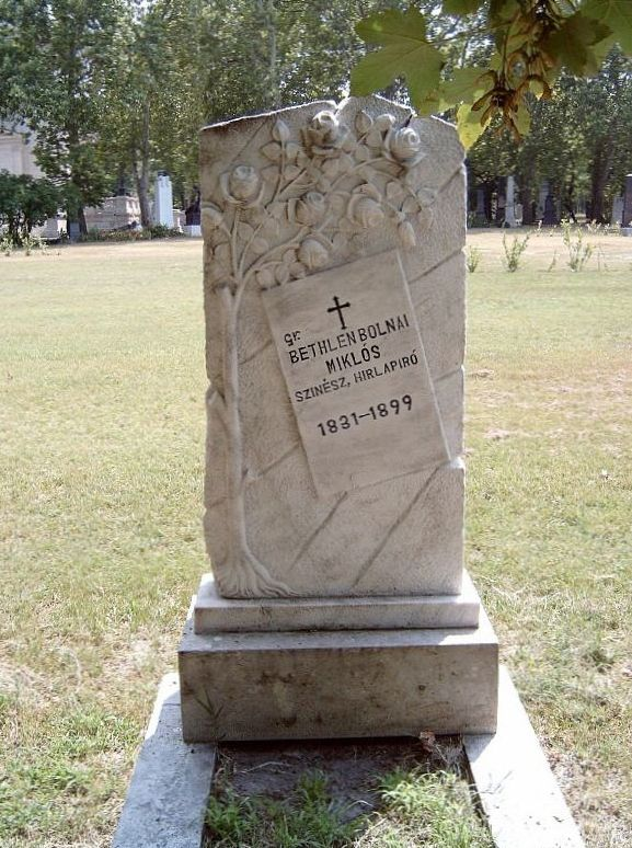 Bethlen Miklós, bethleni, gróf, Bolnai (1831. augusztus 15. – Budapest, 1899. május 2.) drámai színész és hírlapíró sírja Budapesten. Kerepesi temető: 28-18-24